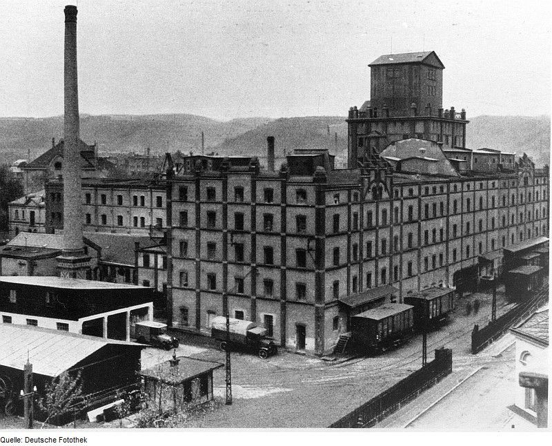 Original image description from the Deutsche FotothekFreital- Deuben. Egermühle 1926, Rückansicht, aus: Die Egermühle 1876-1926